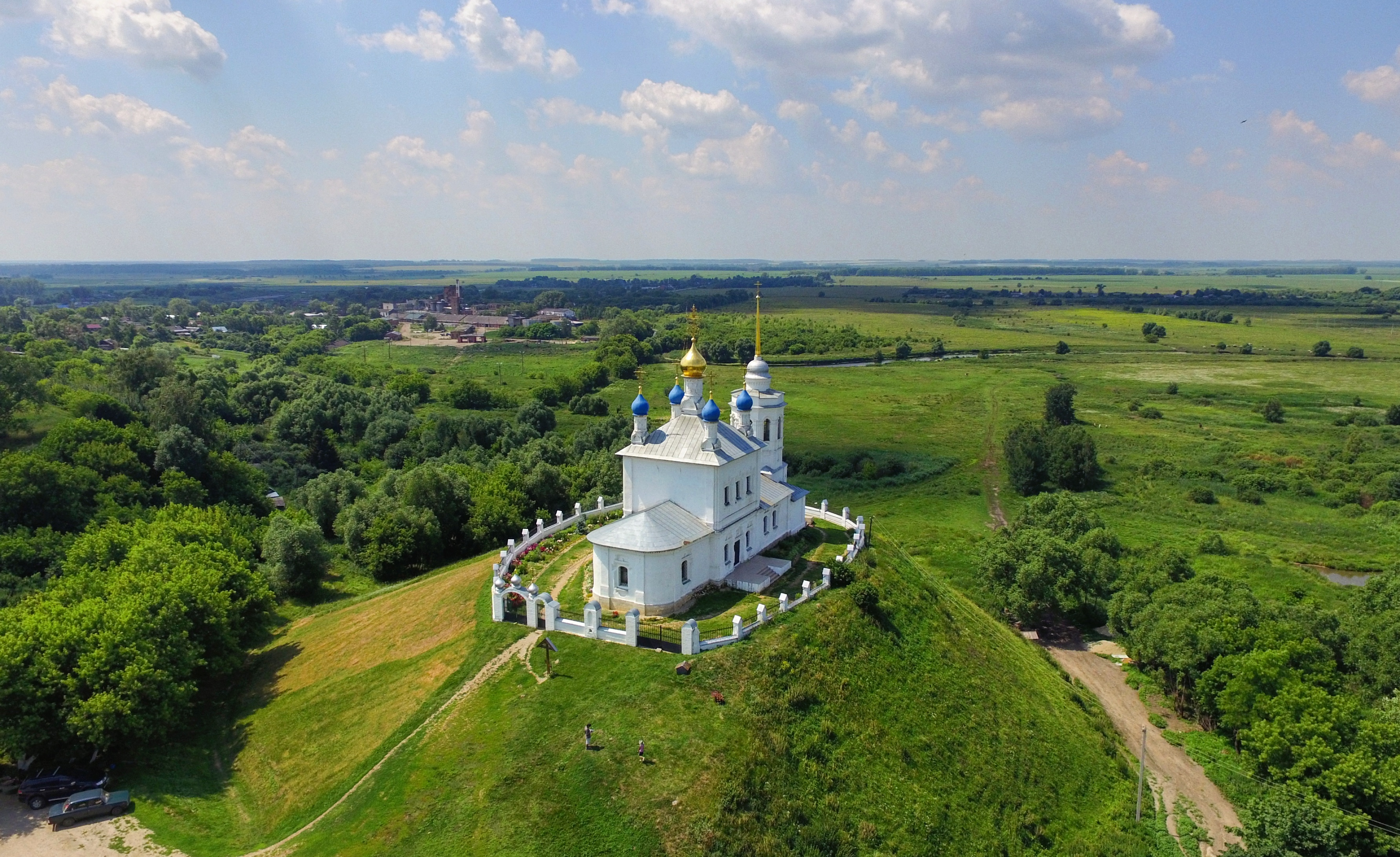 Церковь Успения Пресвятой Богородицы на Федосеевом городище